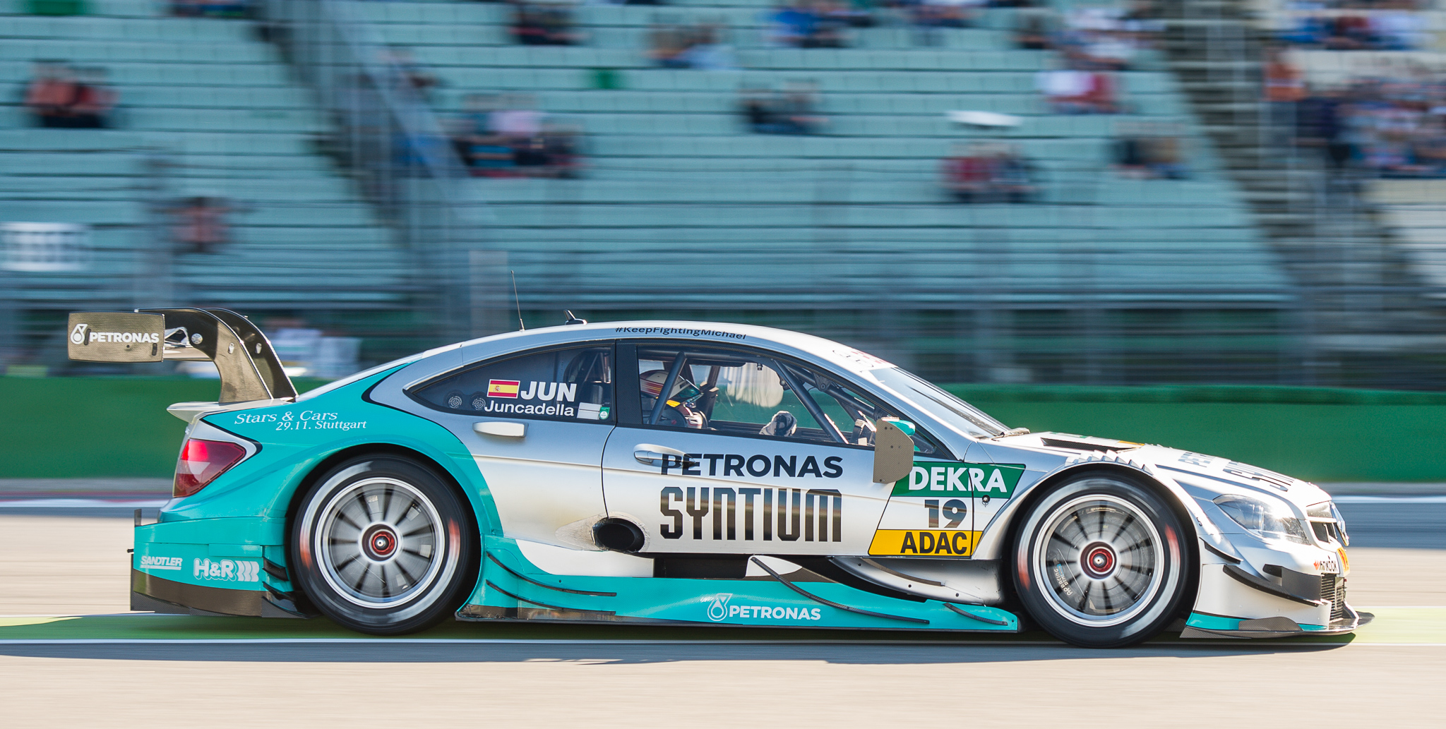 DTM,Daniel Juncadella,Deutsche Tourenwagen Masters,Hockenheimring,Motorsport,Mücke Motorsport,Petronas Mercedes AMG C-Coupe